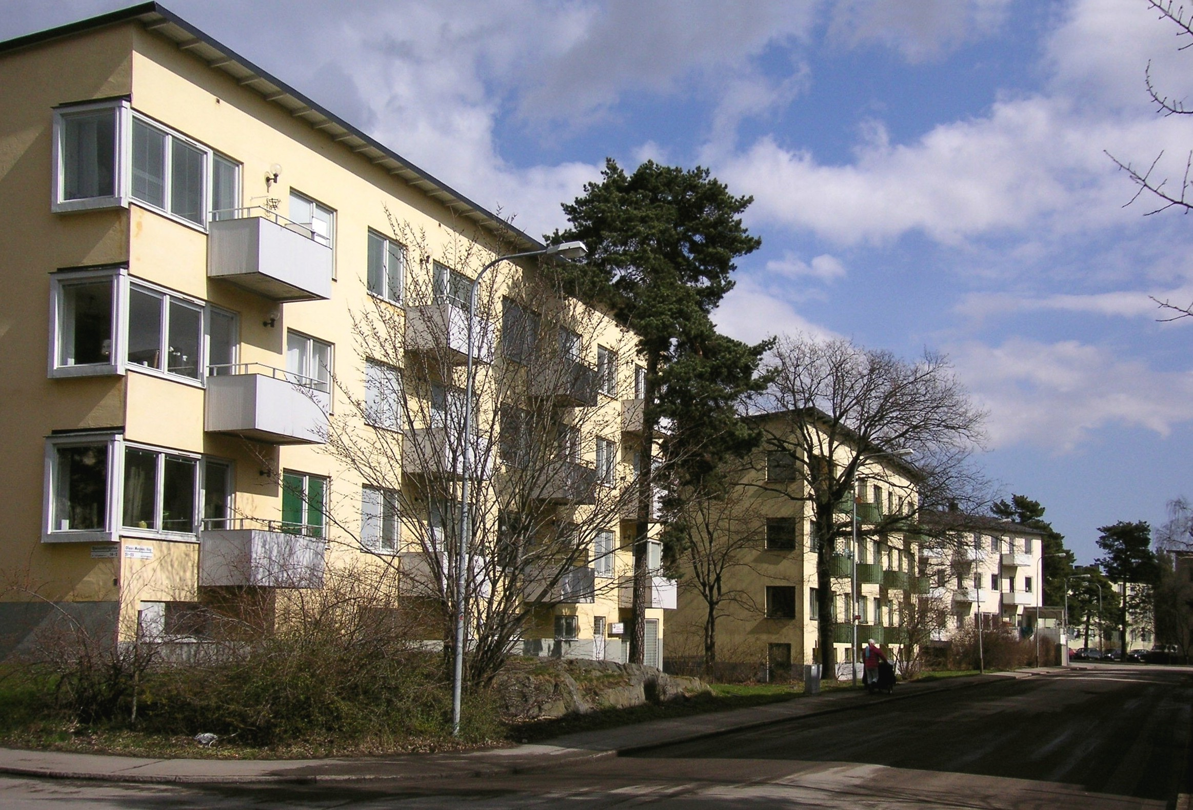 Olaus Magnus väg på Hammarbyhöjden i Stockholm. Kommentar: Hade tur vid fotograferingen, det var städdag och inga bilar störde arkitekturen.